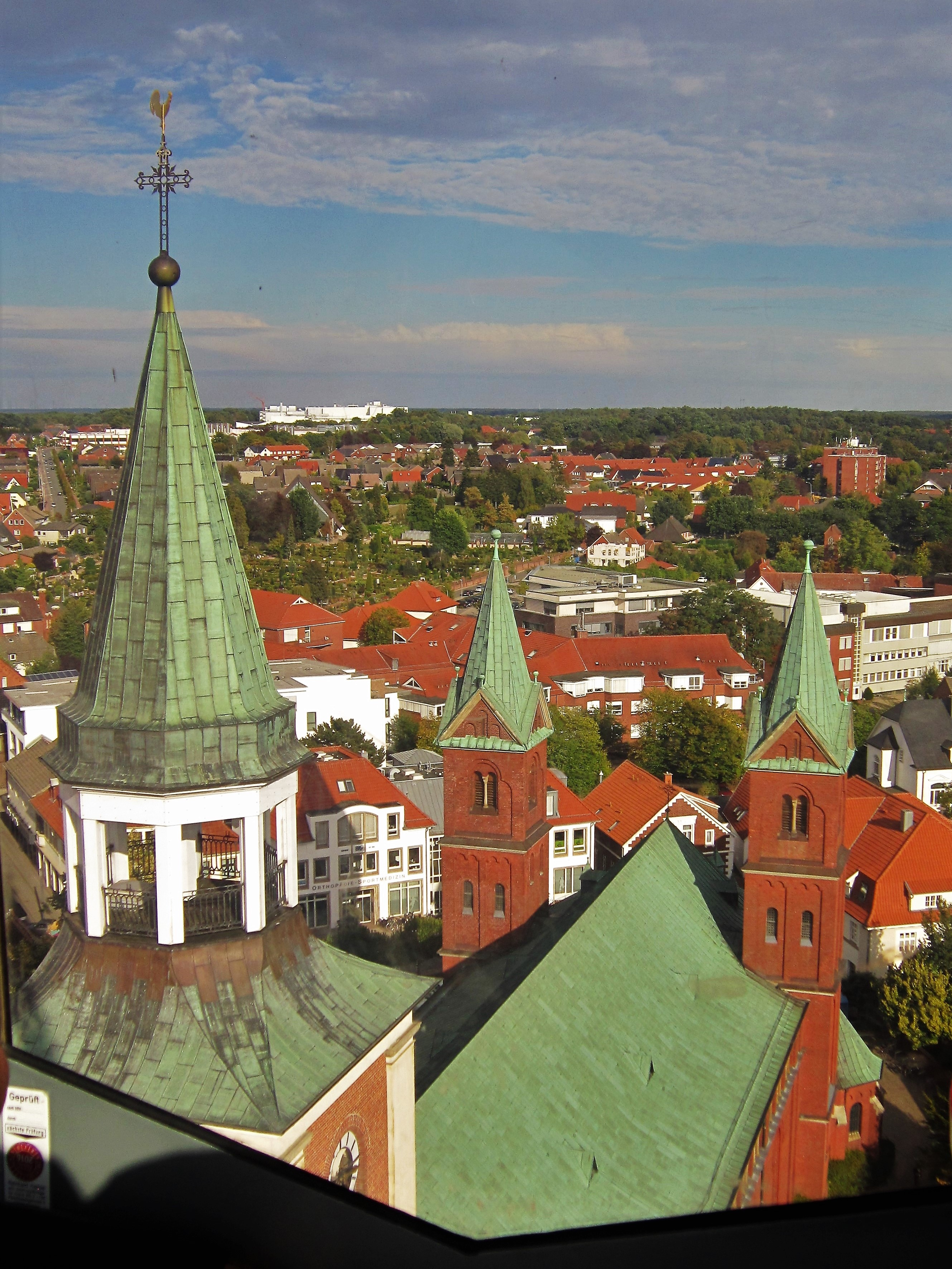 Osten von Lohne. Im Vordergrund die Pfarrkirche St. Gertrud. In der Mitte das Gesundheitszentrum. Im Hintergrund links (weißer Komplex) die Hähnchenschlachterei Wiesenhof.